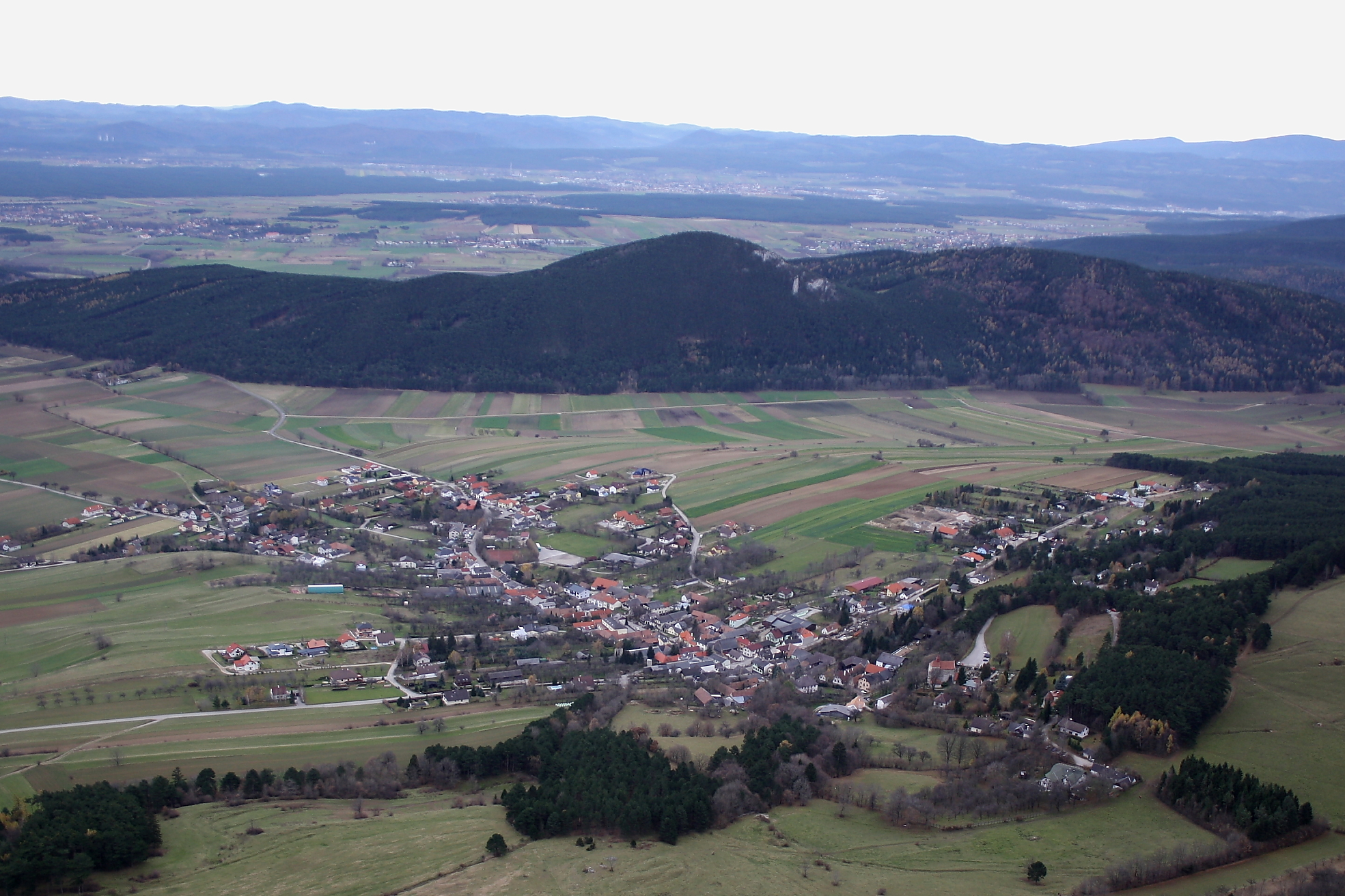 Das Dorf Maiersdorf in der niederösterreichischen Gemeinde Hohe Wand; Nordwestansicht (von der Hohen Wand).